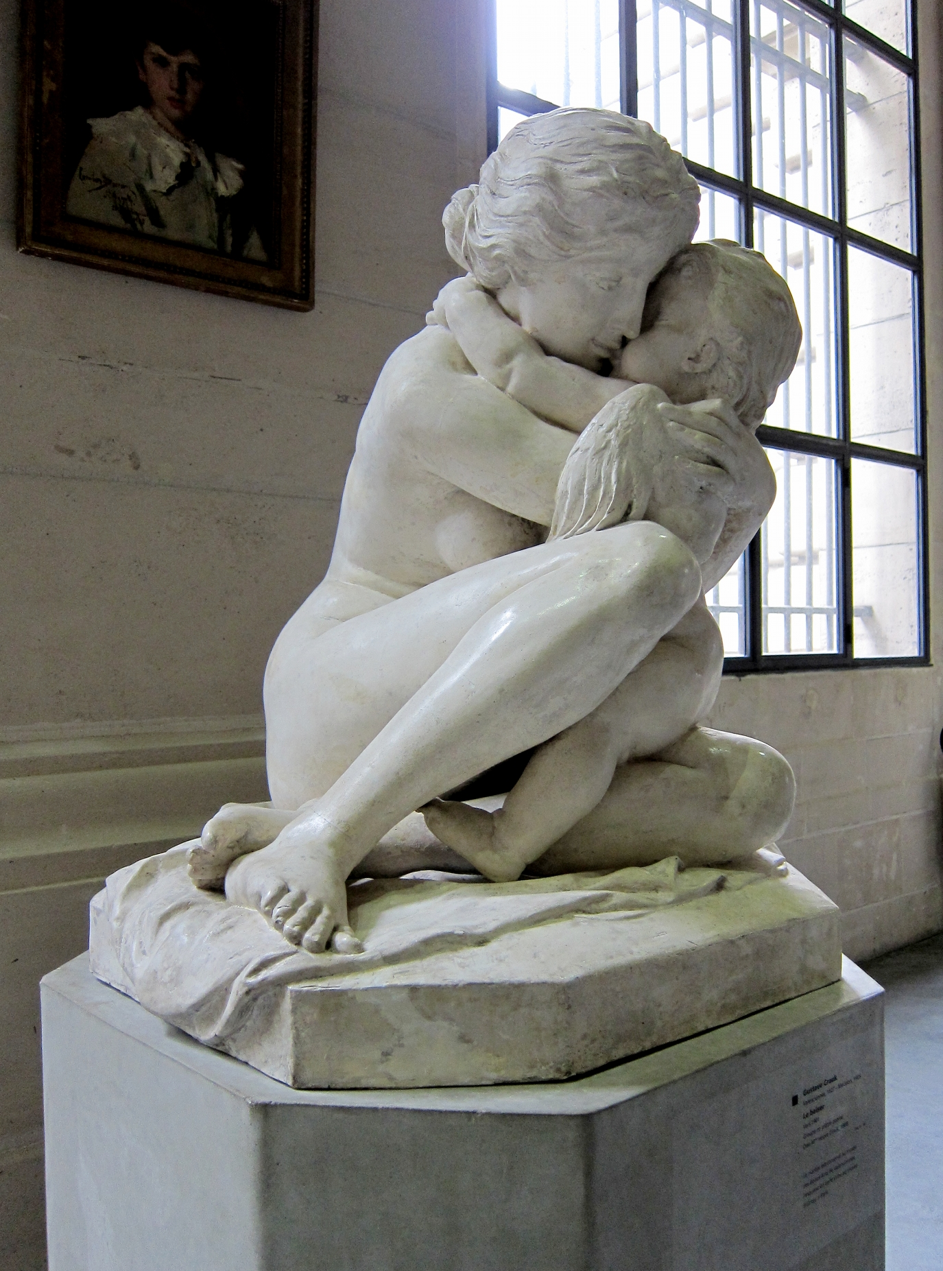 Le baiser de Gustave Crauk au Palais des Beaux-Arts de Lille.